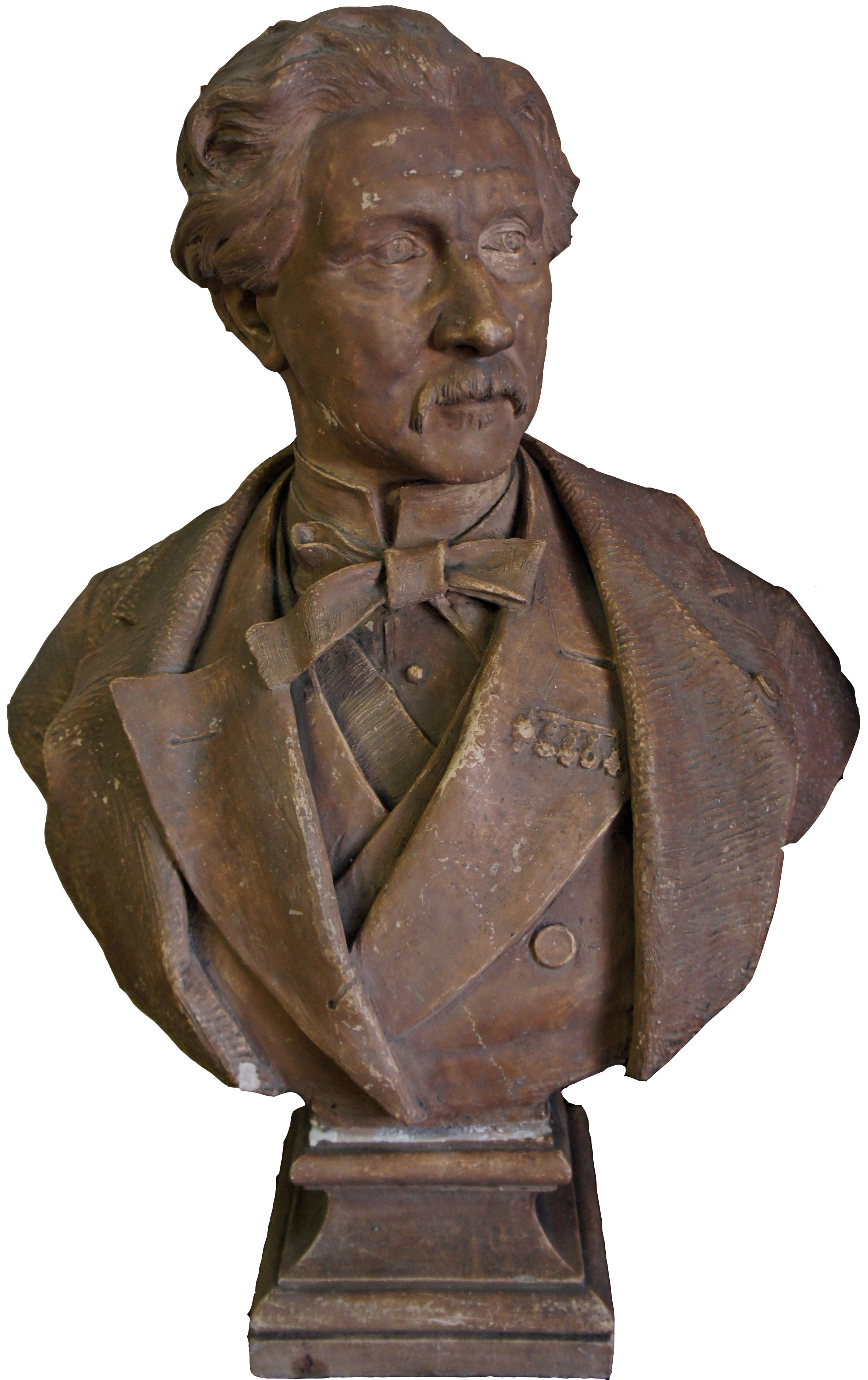 Buste du maire Philippoteaux situé dans l'hôpital de Sedan et dévoilé lors des journées du patrimoine caché.